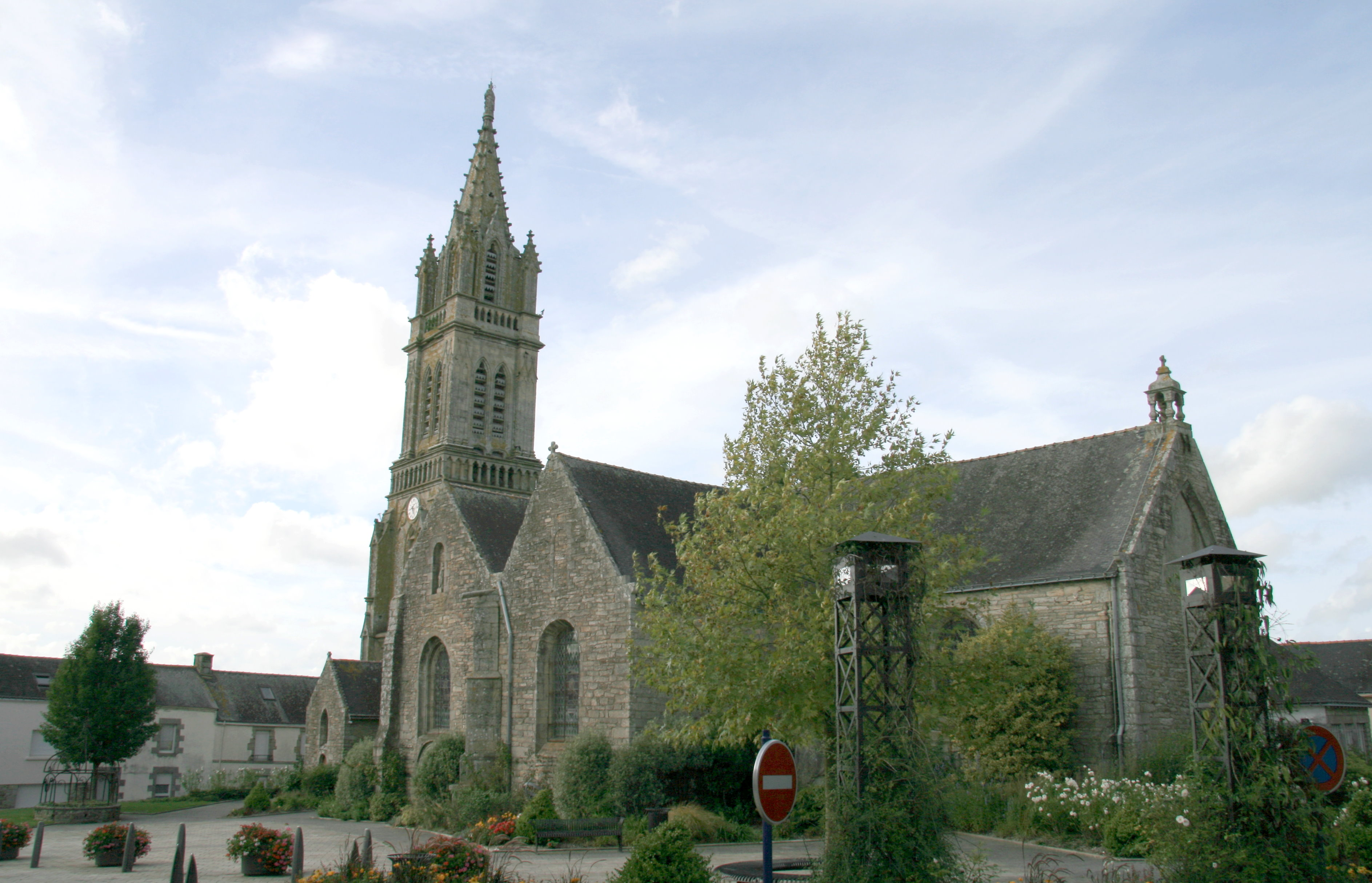 Eglise Saint-Jean-de-Beverley, au centre ville de la commune de Saint-Jean-Brevelay